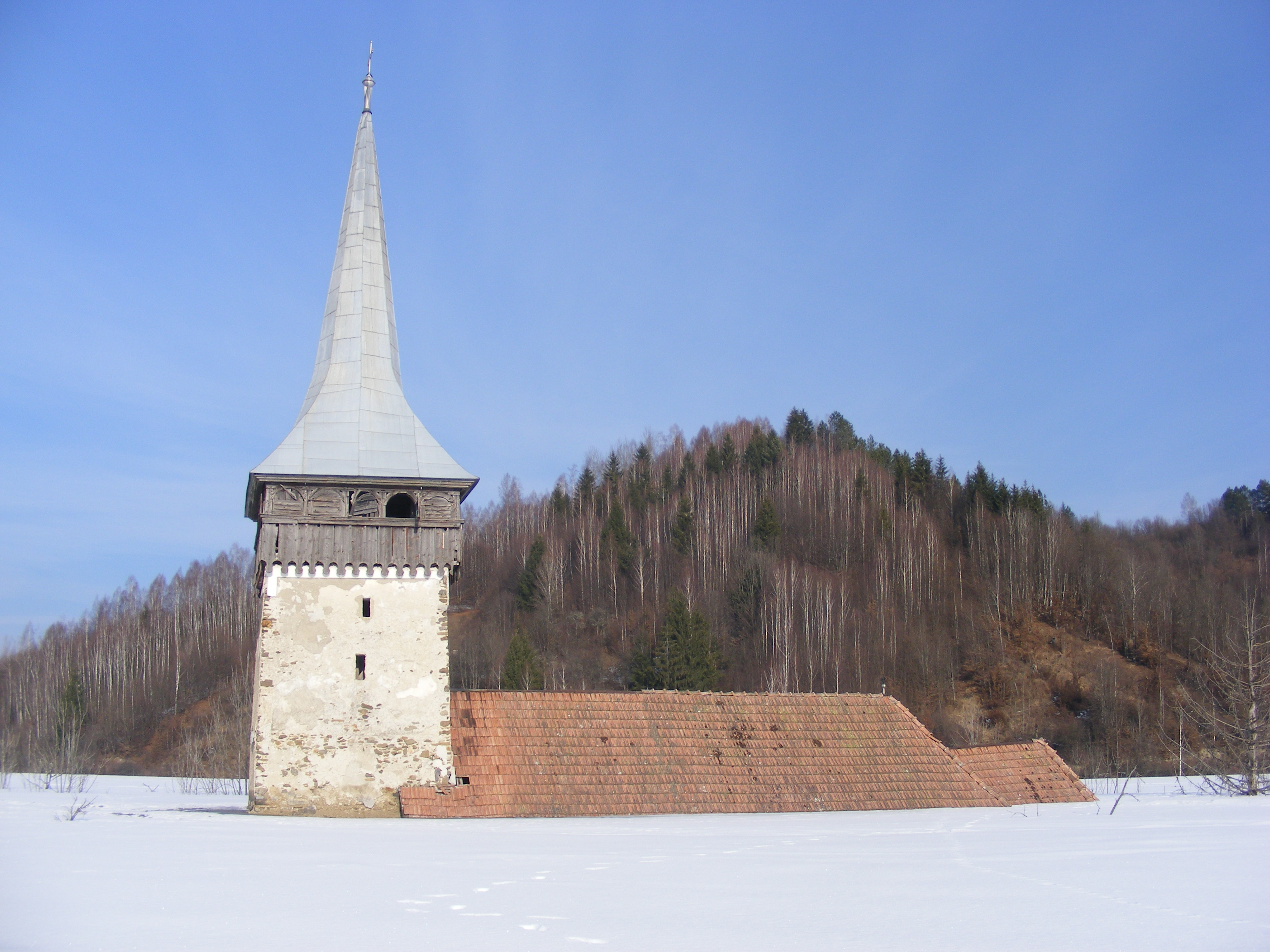 ortodox templom az 1800-as evekbol